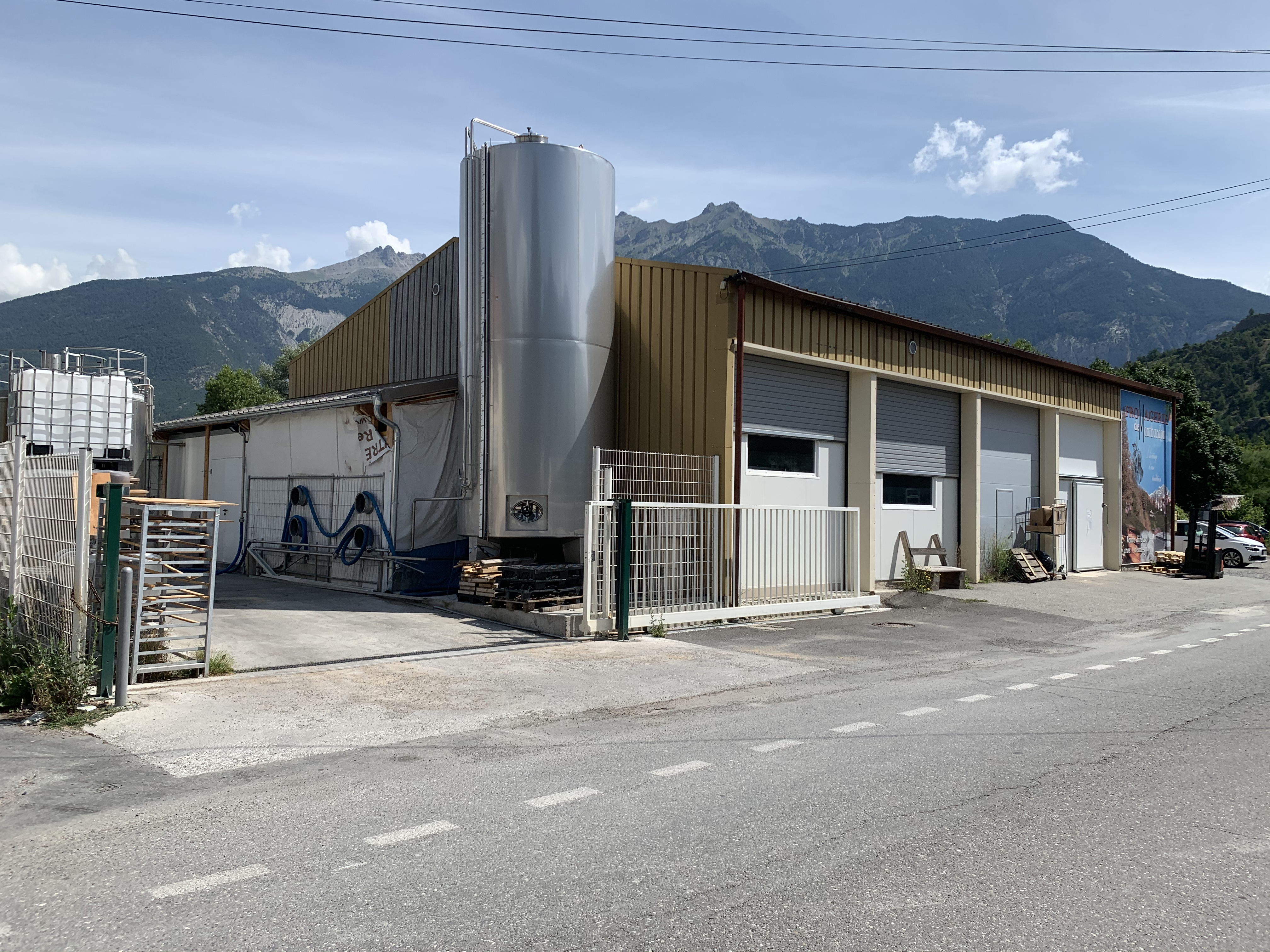 Fromagerie de Montbardon à Eygliers (Hautes-Alpes).